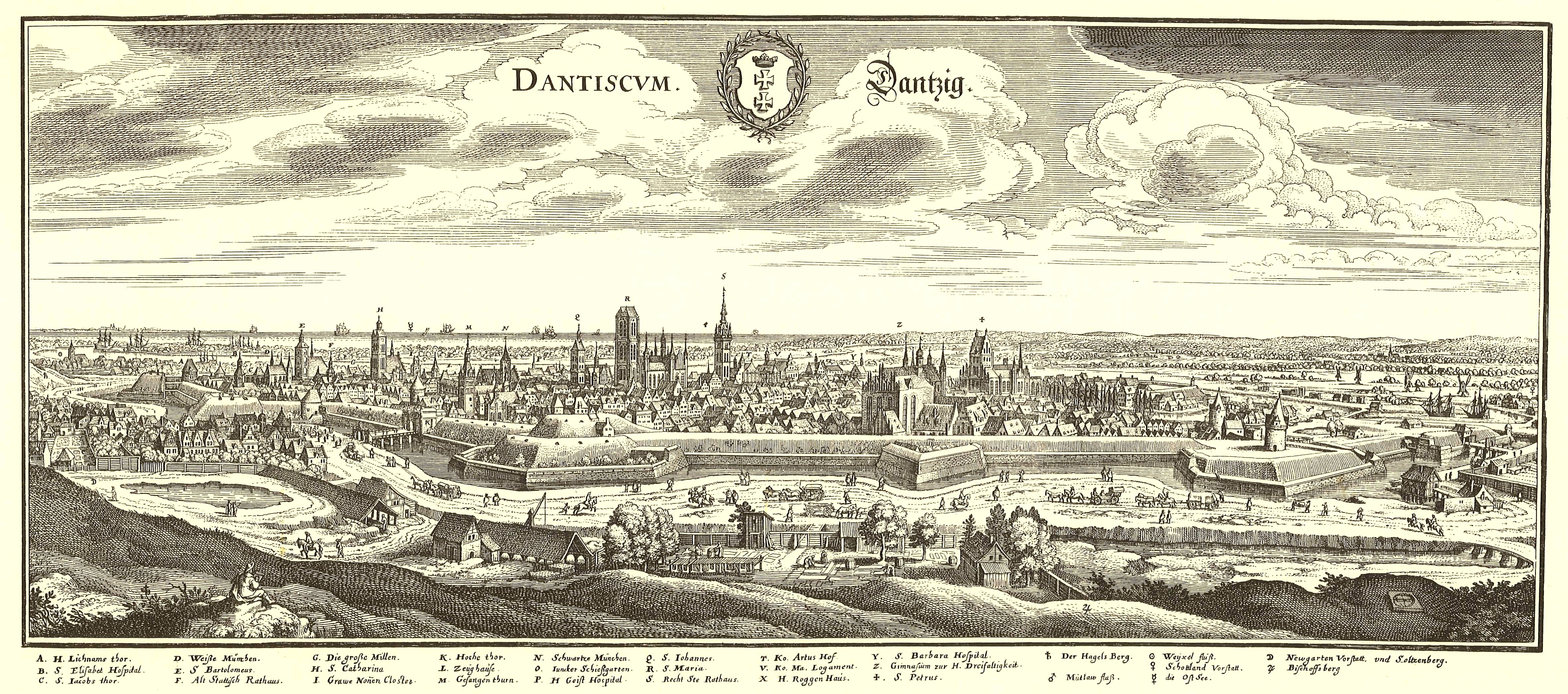 Panorama der Stadt Danzig aus der Topographia Germaniae mit zugehöriger Bildbescheibung am unteren Bildrand